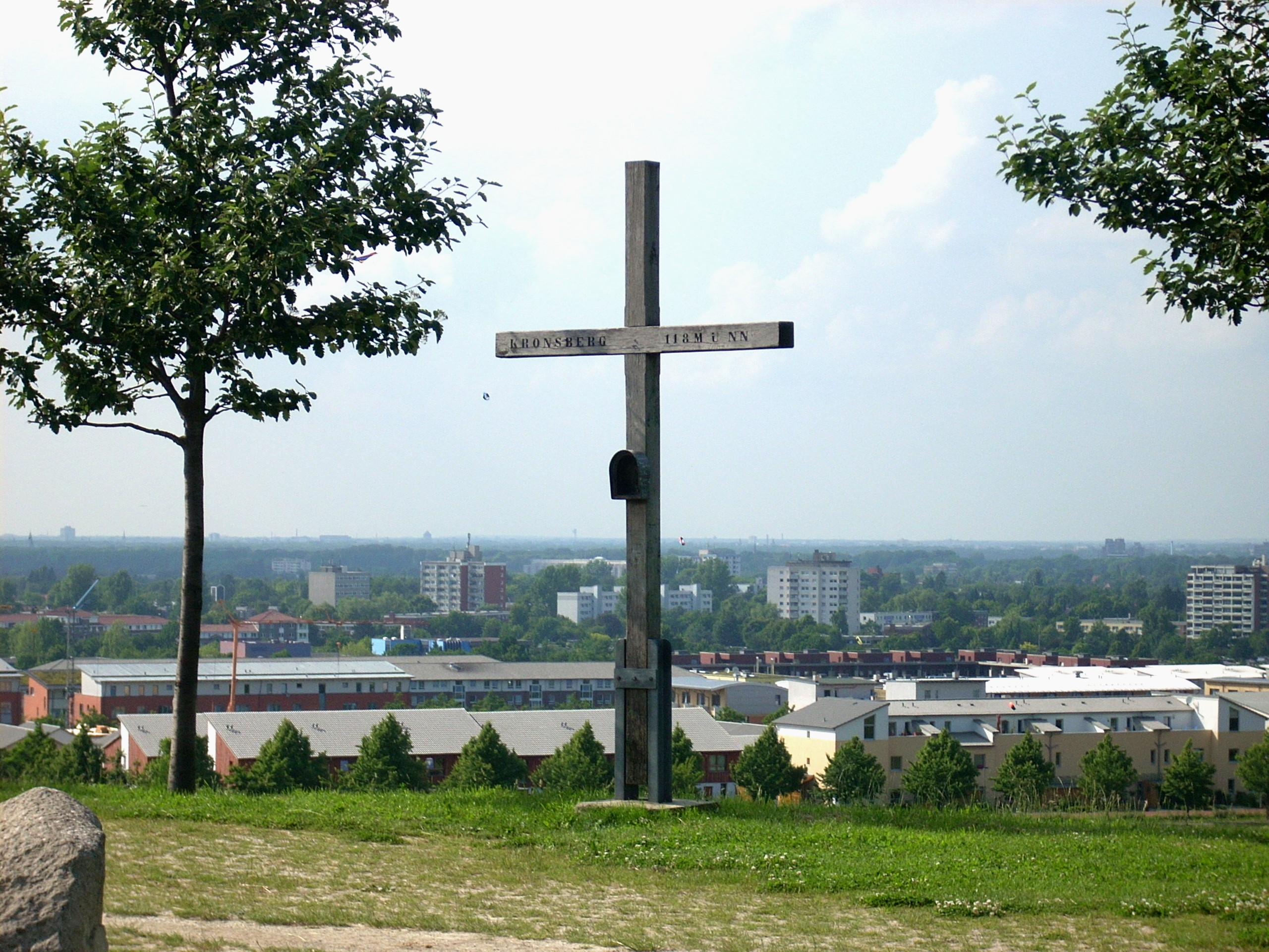 Kronsberg, Hannover, view